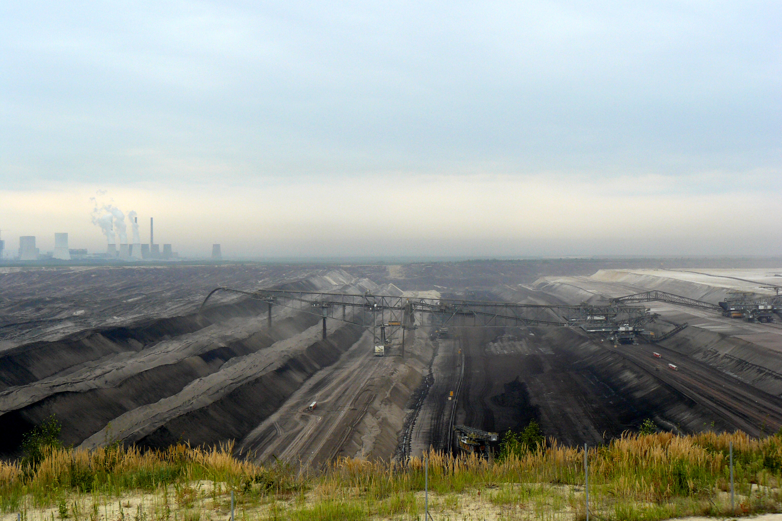 Blick in den Tagebau Nochten. Förderung der Rohbraunkohle.